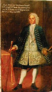 Fotografia do quadro existente na Galeria dos Governadores no Palácio de São Lourenço, no Funchal (Madeira, Portugal)